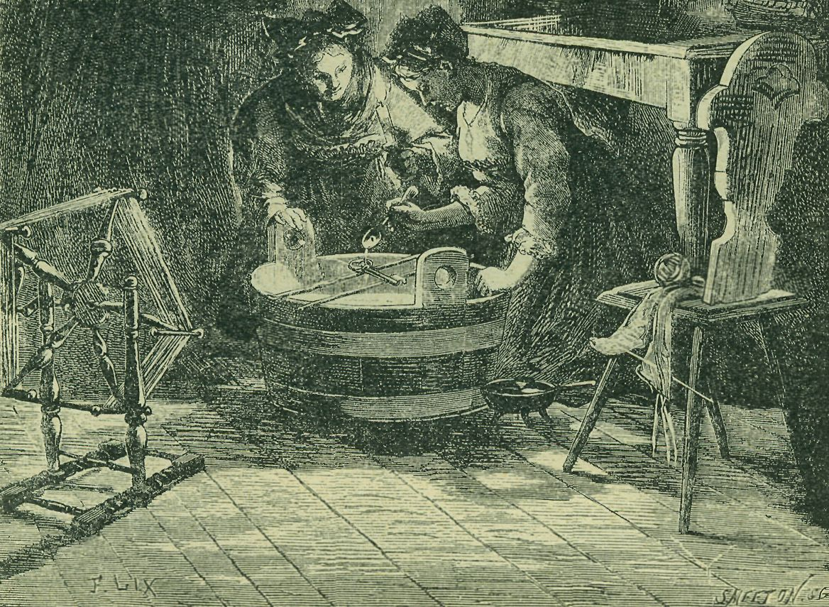 Sléváni olova lžicí přes klíč křížový na sv. Ondřeje. Vyobrazení ze sbírky J. Dotřela.